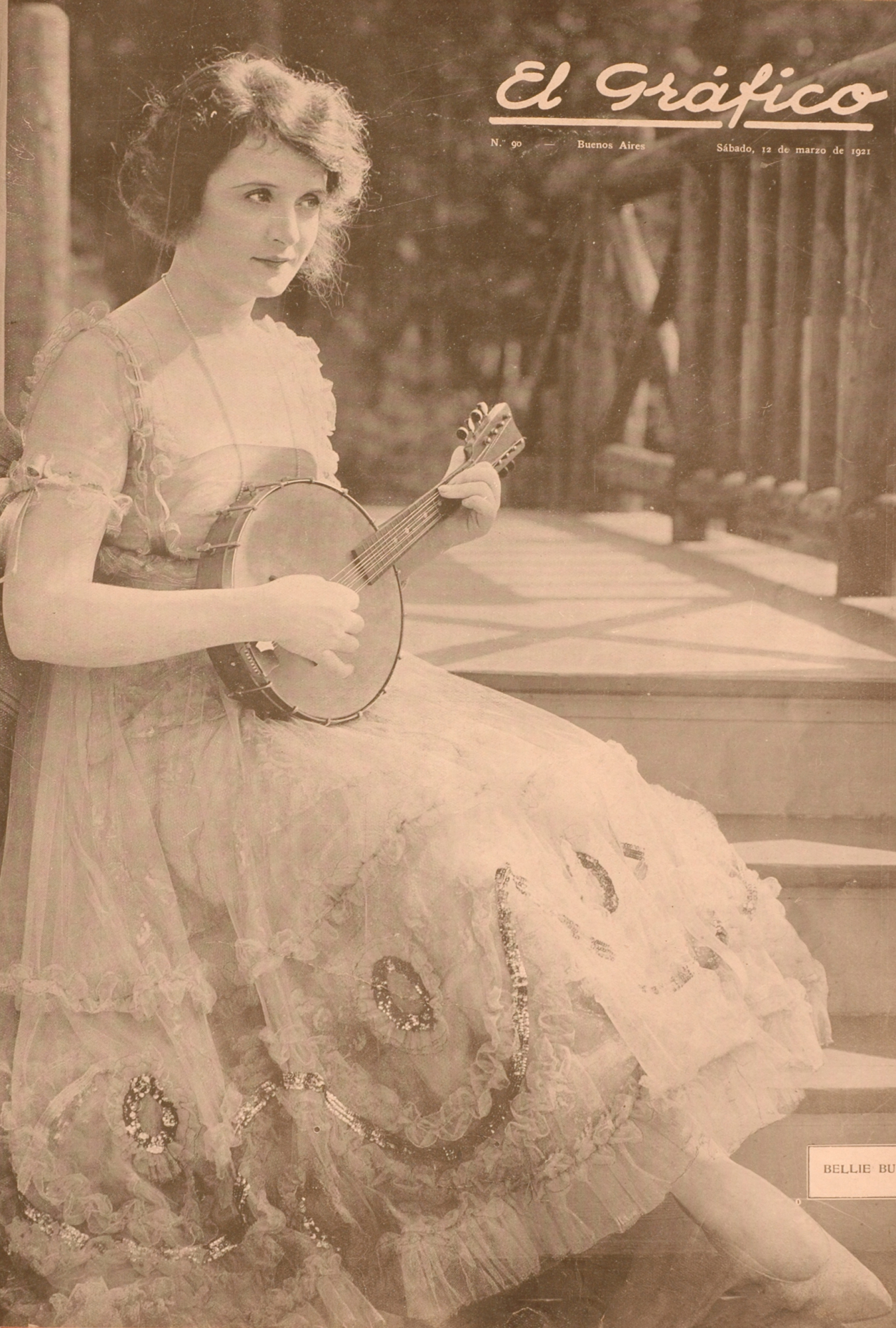 El Grafico del 12 de Marzo de 1921. Edicion 90